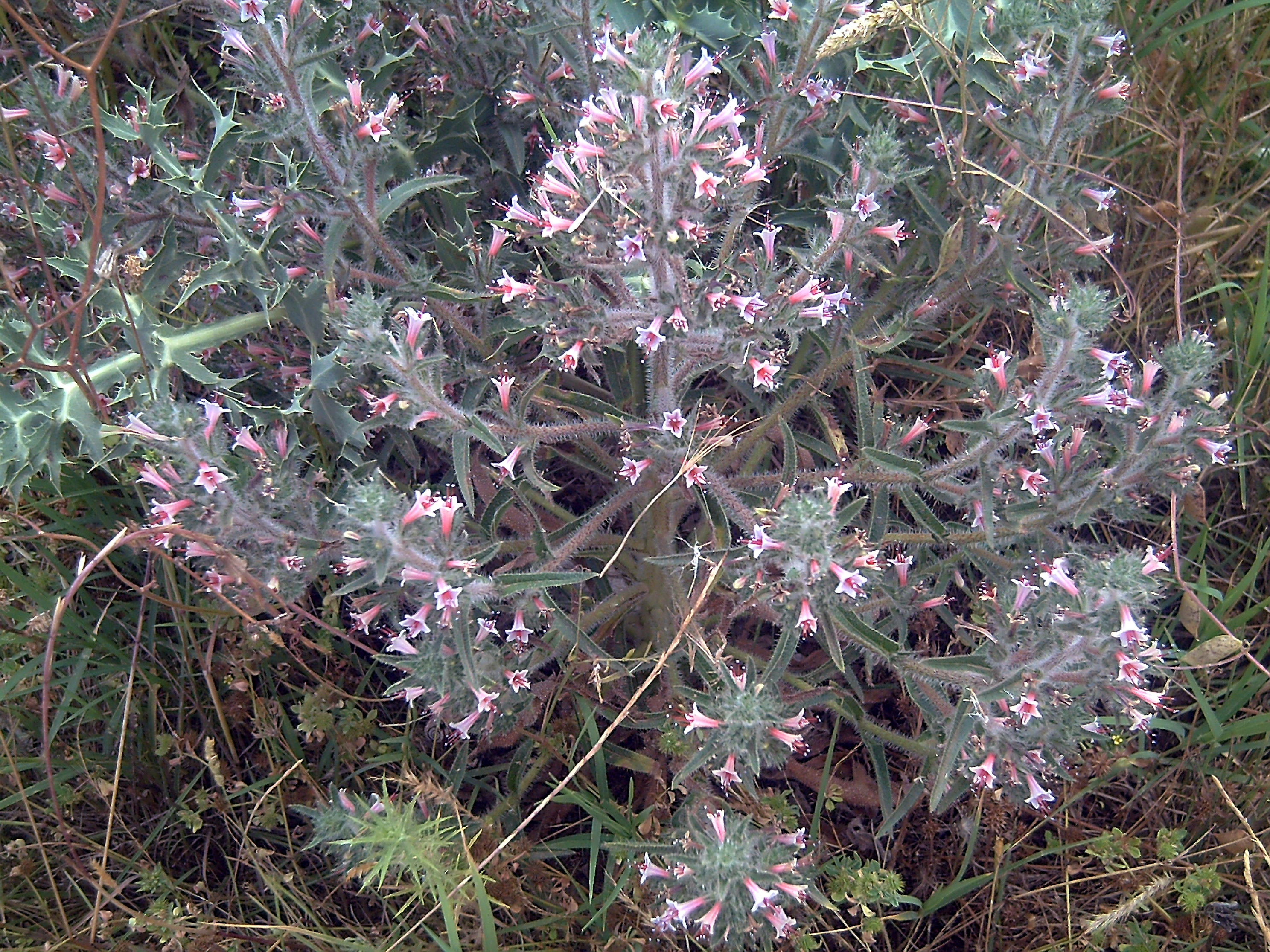 Echium_asperrimum habitus, Cañada de Calatrava